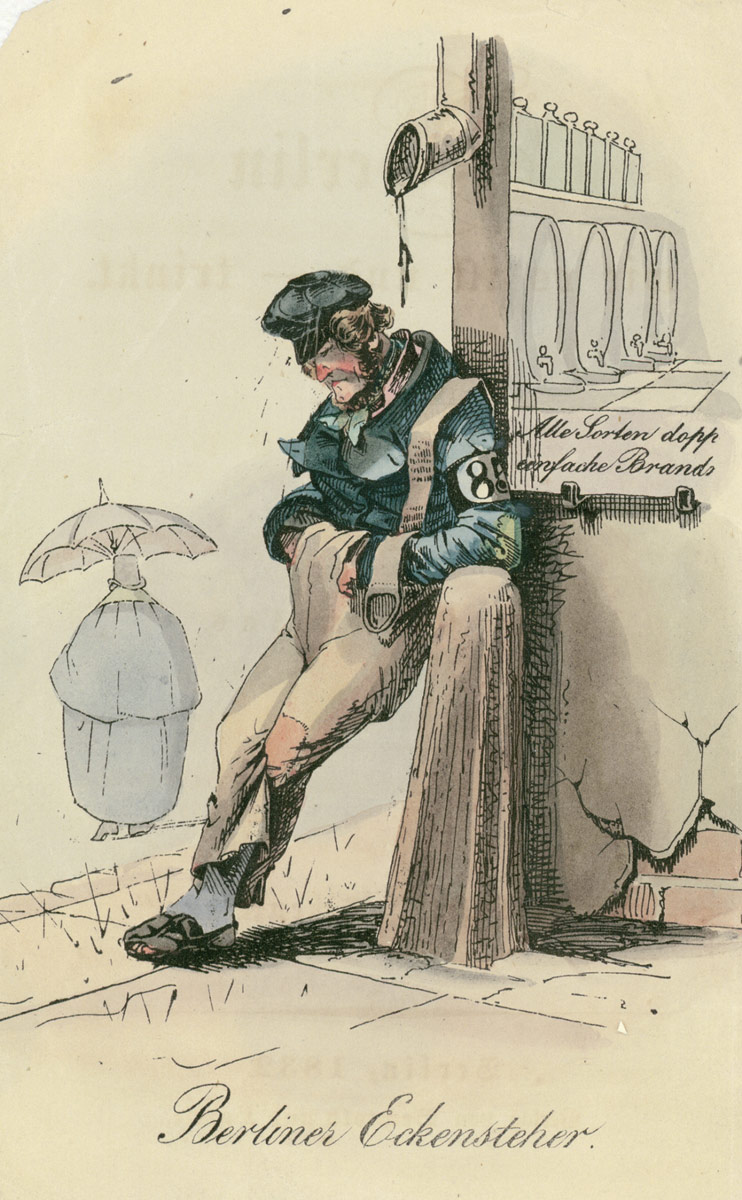 Berliner Eckensteher, aus: Adolf Glassbrenner: Berlin wie es ist und - trinkt. 1834-1848